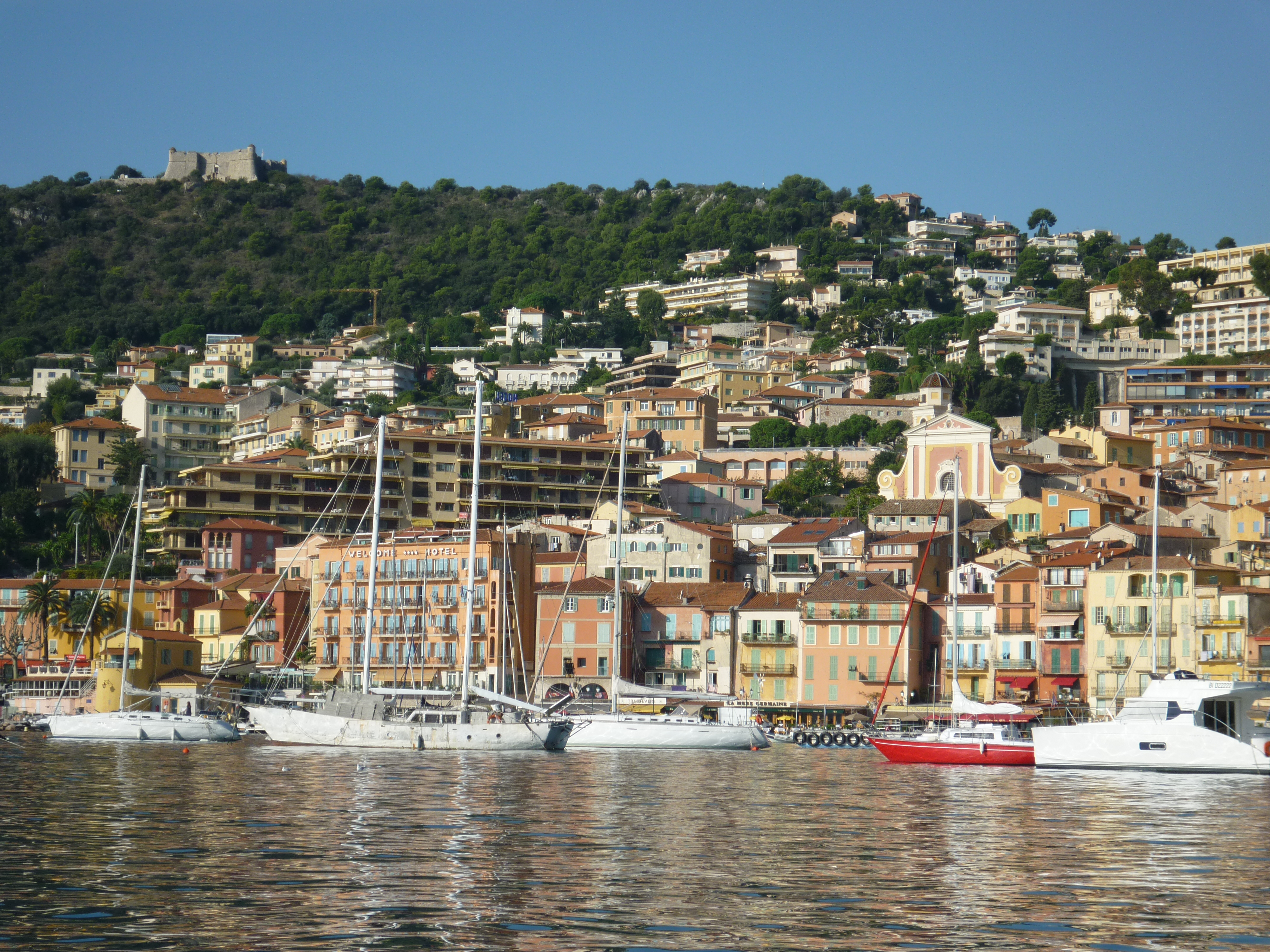 Villefranche-sur-Mer (Alpes-Maritimes) vue depuis la Rade, avec au dessus le fort du Mont-Alban